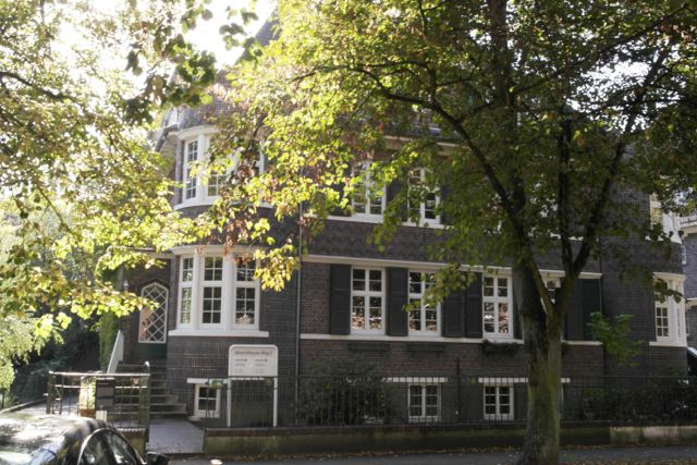 Wohnhaus in Bremen, Schwachhauser Ring 2Die Denkmalgruppe ist ein geschütztes Kulturdenkmal in der Freien Hansestadt Bremen, mit der Nr. 1164 beim Landesamt für Denkmalpflege registriert.